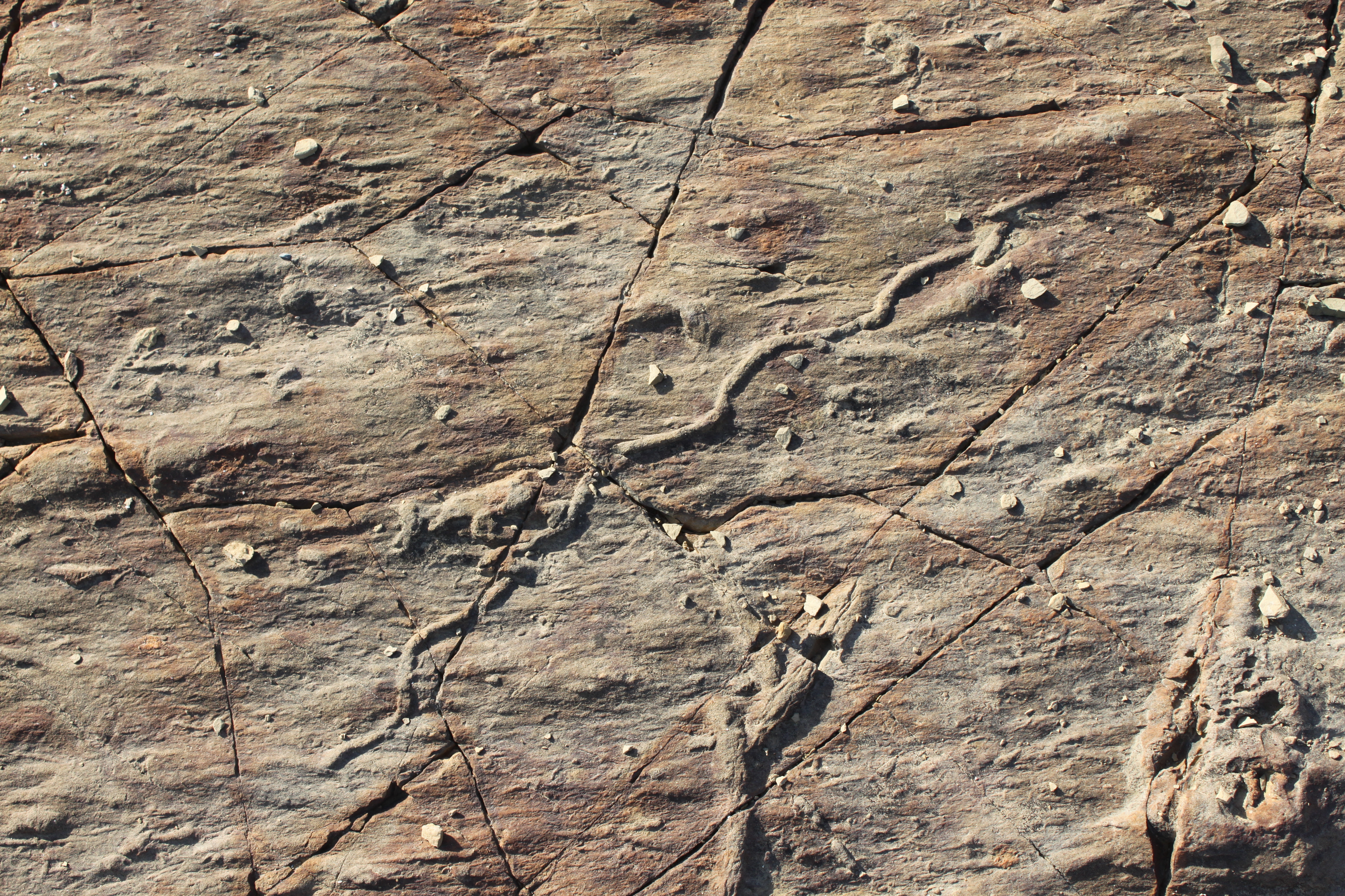 Icnofósil Cochlichnus (Hitchcock, 1858) en arenisca de los flyschs de punta San García. Complejos del Campo de Gibraltar, Unidad de Algeciras (Oligoceno-Mioceno). Algeciras, Andalucía, España.